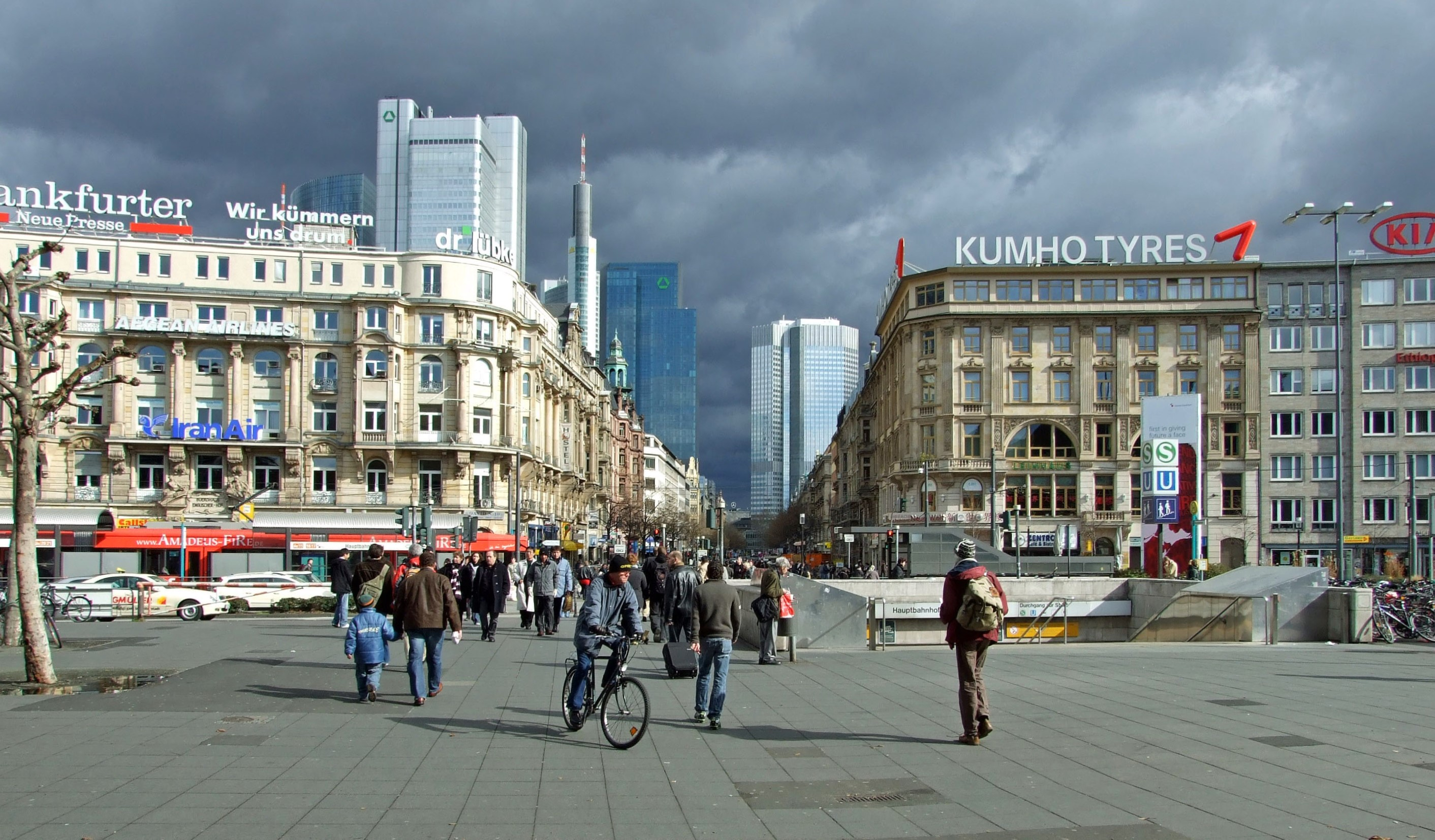 „Ende“ der Kaiserstrasse in Frankfurt am Main, Blick vom Platz am Hauptbahnhof